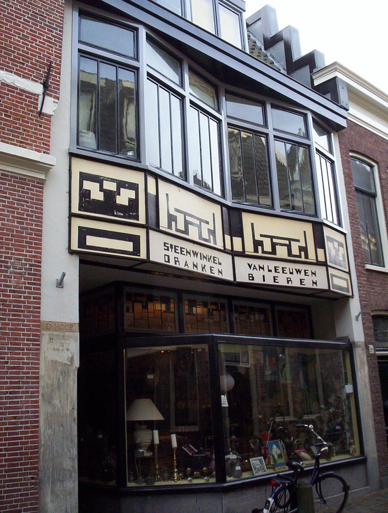 Ridderstraat 20, Centrum Haarlem, Woning, winkel en werkplaats ontworpen door J. van Loghem, 1924. Nu is in het pand een uitdragerij gevestigd, daarvoor een drankenhandel. Oorspronkelijk was er een meubelwerkplaats gevestigd. De ramen op de eerste verdieping konden oorspronkelijk als een harmonica openschuiven of dat nog steeds kan??? Geen idee. Het houtwerk was voorheen in de oorspronkelijke 20'er jaren kleuren geverfd: lindegroen, steenoranje, gebroken wit en zwart. De huidige bewoners hebben het groen en oranje verwijderd. Links naast de deur staan het woord 'D'Hoop', aanpalend zijn de panden 'De Liefde' en t Geloof' te vinden. Zie een beschrijving alhier